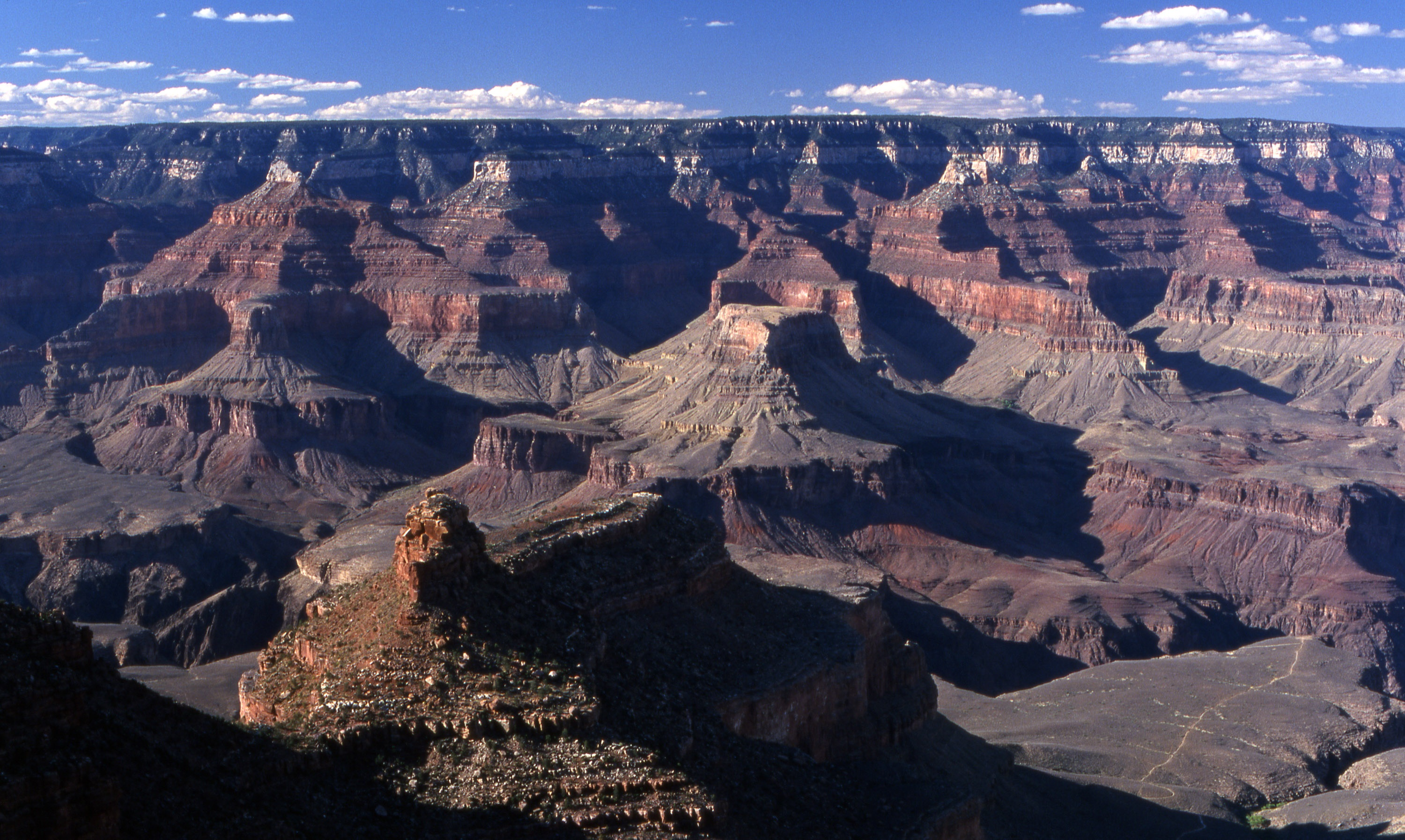 Gran cañon del Colorado, Arizona, E.U.